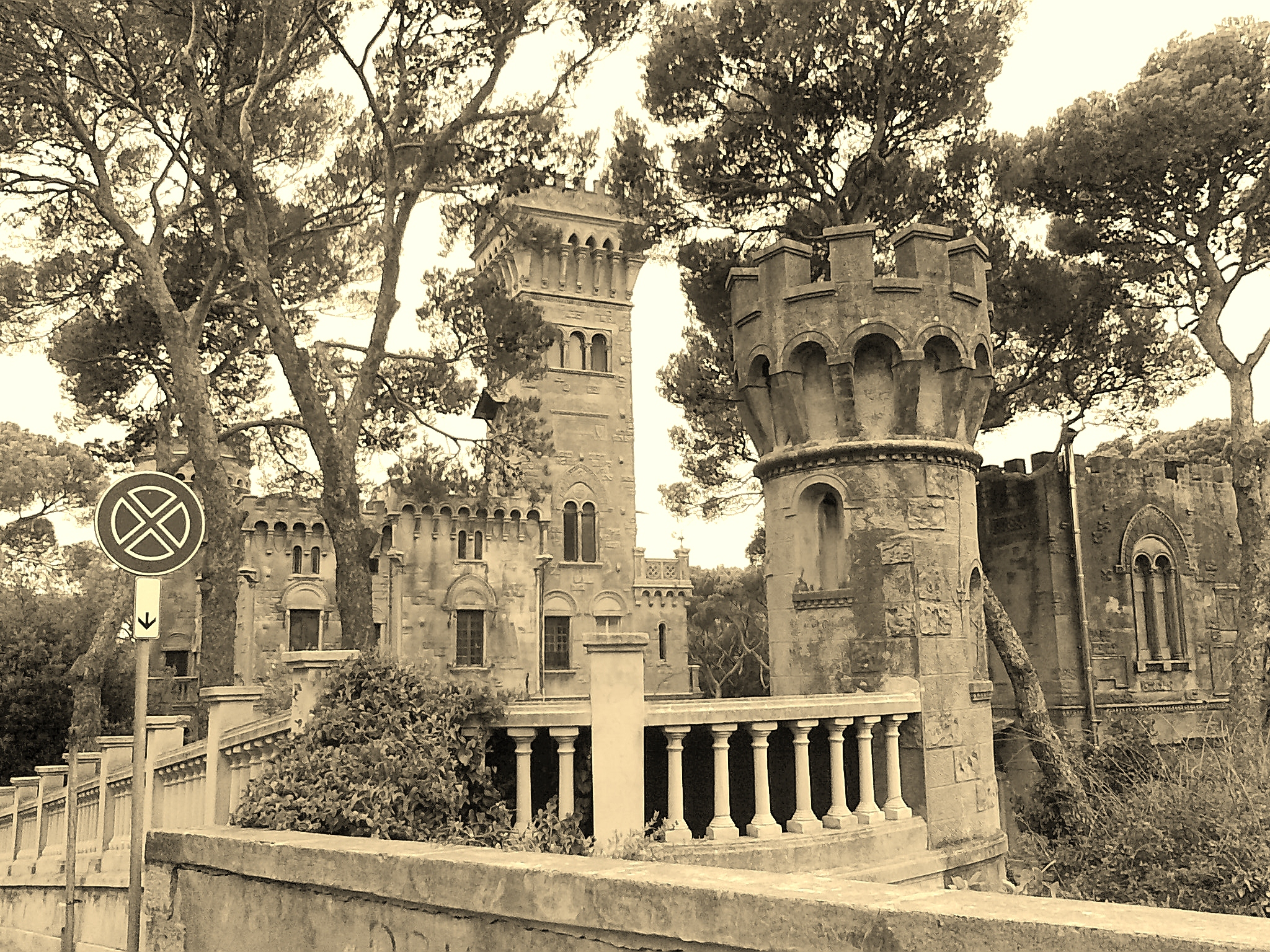 Livorno: Villa Jana nella frazione di Quercianella, edificio neomedievale costruito nei primi decenni del XX secolo